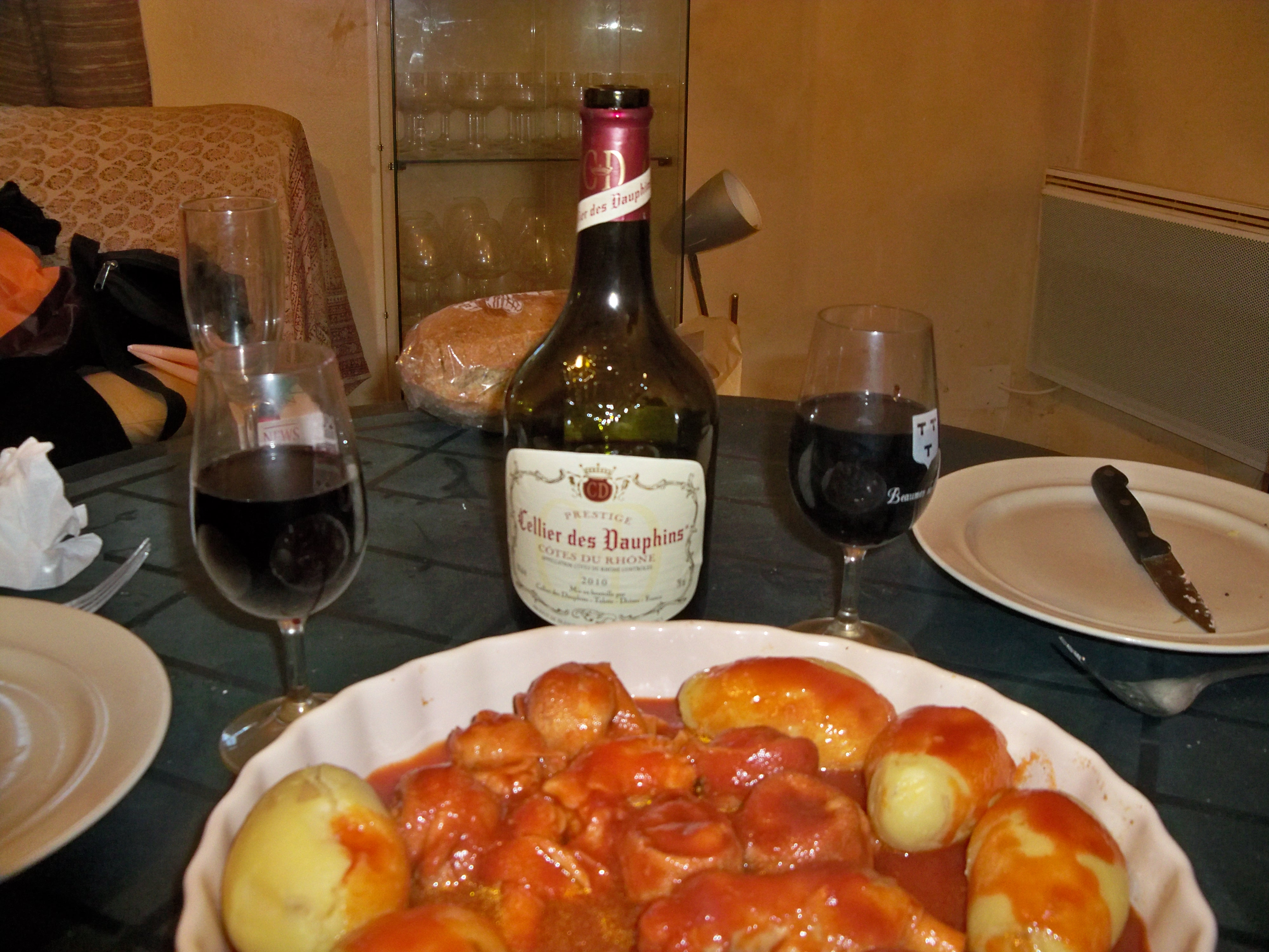 Bouteille de Cellier des Dauphins rouge